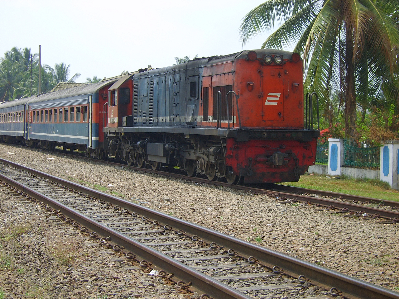 Ptkabb203 (203 02 C)